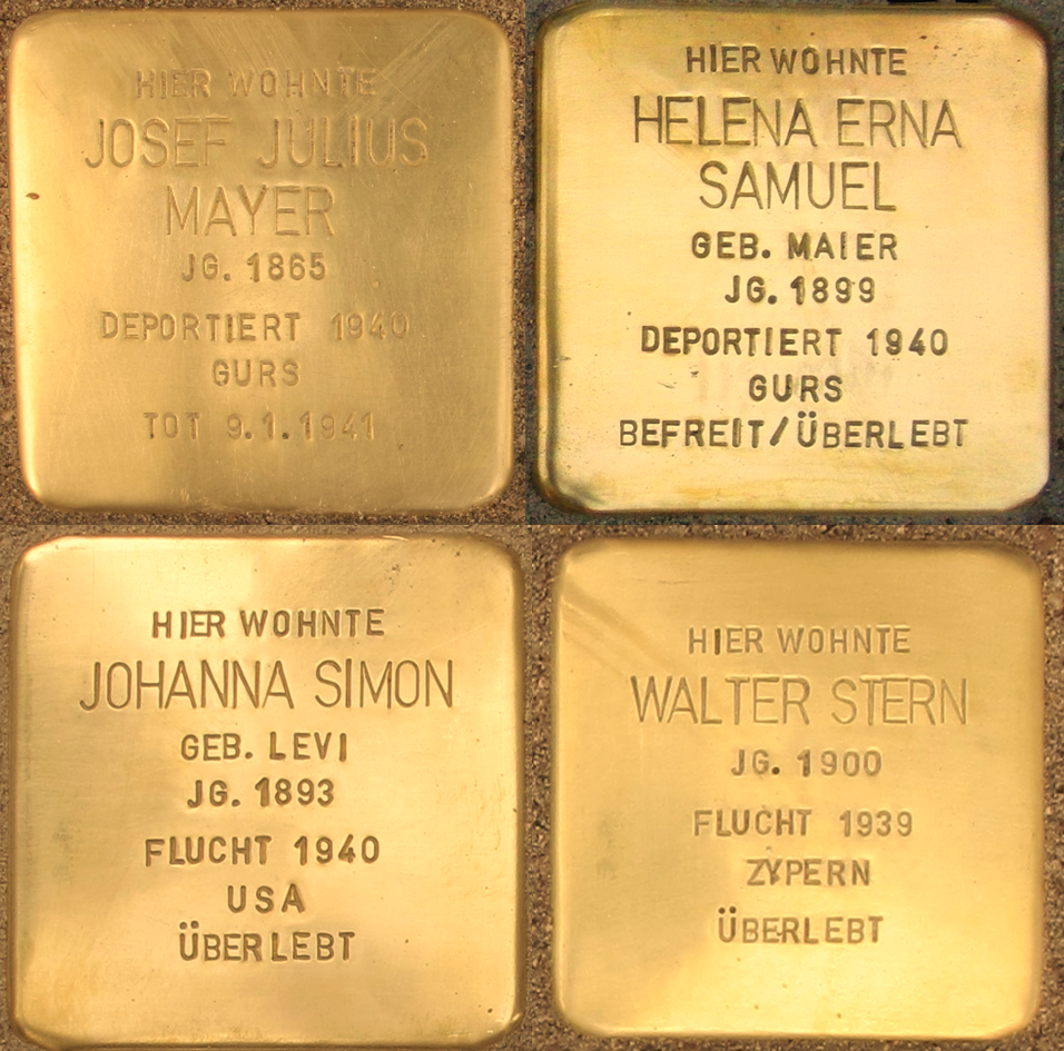 Deutschland (D) - Baden-Württemberg (BW) - Landkreis Rastatt (RA) - Rastatt: Stolpersteine